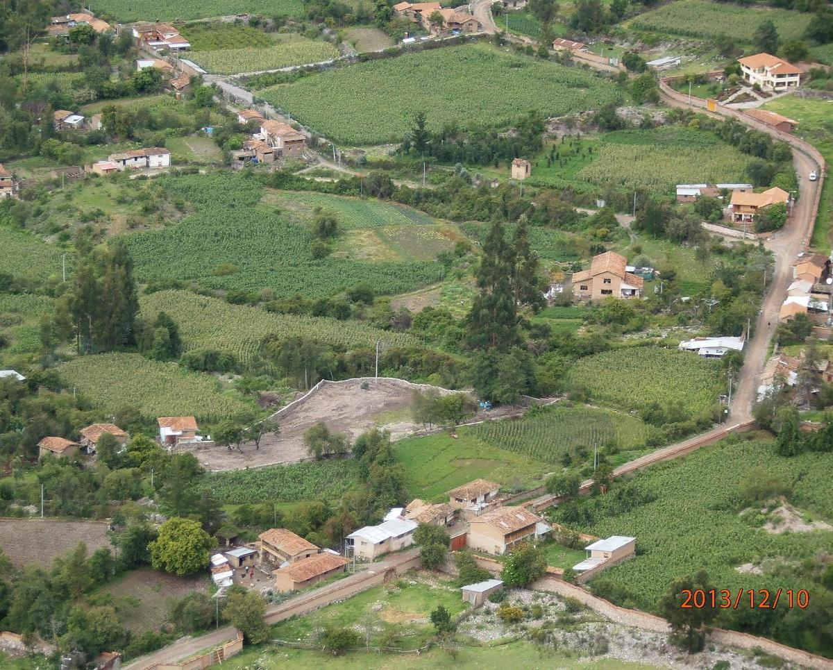 vista parcial desde arriba de yanahuara